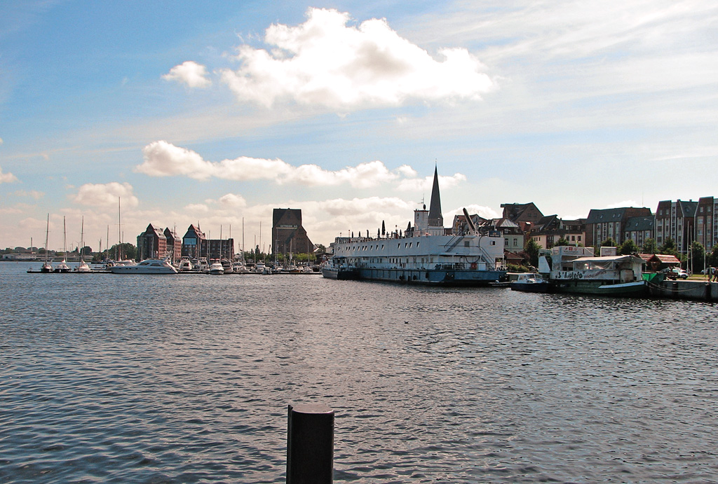 Beschreibung: Stadthafen in Rostock / Germany Fotograf: Darkone, 17. August 2005